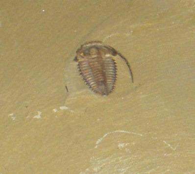 Fossil of Eoredlichia, an extinct trilobite- Took the photo at Natural History Museum of Maastricht